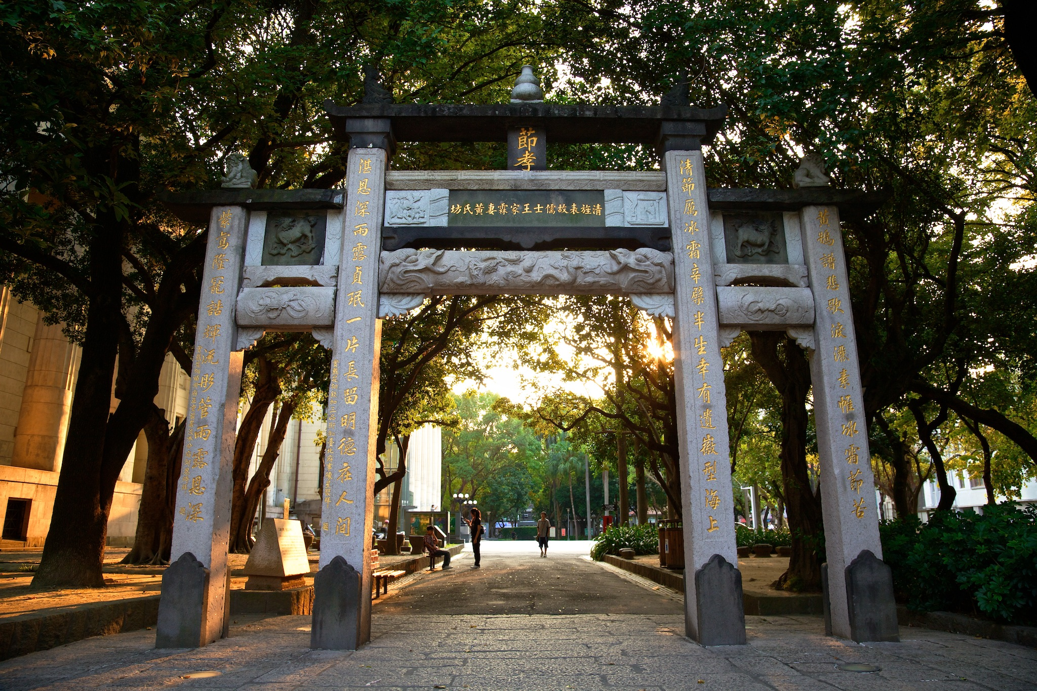 黃氏節孝坊，座落於臺北市中正區228公園內，創建於清朝光緒八年（1882年）。黃氏，生於清嘉慶二十五年（1820年）九月九日，卒於光緒十九年（1893年）二月二十八日，享年七十四歲。 黃氏十六歲時，嫁給祖籍福建泉州府晉江縣南關外二十三都水頭鄉大她一歲的書生王家霖為妻。王家霖，名媽赤，家霖是他的官章，為艋舺富商王宗河的長子。王家霖前往臺灣幫忙父親經商，留下妻子黃氏在故鄉照顧母親許氏。黃氏二十八歲那年，夫君考試未取，力圖振奮，竟因體力不支而辭世。哀慟之餘，她立誓撫孤守節。其後，王宗河繼娶副室黃氏懿柔，定居艋舺頂新街，並接黃氏一家來臺同住。黃氏來臺後，事奉翁姑至孝，教子成人，各有所成。 同治九年（1870年），黃氏年五十一，受旌表，賜金三十兩，聽本家建坊，並建節孝祠。光緒八年，黃氏之子王天錫為旌表其母節孝事蹟，籌建牌坊，親自前往泉州延聘工匠，選購石材，建坊於臺北府城東門內。節孝祠則延至光緒二十一年（1895年）臺灣割日時才建成，但卻因日人徵地官用，而強迫拆除移建於圓山公園。明治三十四年（1901年），黃氏節孝坊也因日人為建官舍，而移建於新公園內。 黃氏節孝坊為四柱三間二層的石造牌坊，平面由四根方柱，呈一字排列。明間內側柱身高出底層護檐，柱頂用櫨斗承頂層護檐，護檐下有直立的「節孝」匾一方，匾下橫額題：「清旌表故儒士王家霖妻黃氏坊」。 明間大額枋承鼓形截面，上下緣平齊，兩側渾圓外突，兩端用龍首箍頭，中央枋心陽面雕「雙龍搶珠」，陰面雕「雙鳳戲珠」。次間額枋上雕刻有「琴棋書畫」。頂層護檐兩端有鴟尾脊飾，底層護檐脊飾遺失。四根方柱上前後均刻有楹聯，以彰顯黃氏的節孝事蹟。楹聯包括：賞戴花翎欽加三品銜知臺府事陳星聚、賞戴花翎補用府正堂前署淡水分府何恩綺、賞戴花翎署理臺北艋舺水陸參府海壇左營遊府銳勇巴圖魯鄭榮及陳季芳等人的題字。 民國七十九年（1990年），因臺北市規劃都會區大眾捷運系統，黃氏節孝坊正處於新店、淡水線新公園站的車站及工作坑上，因而執行拆除工作，原物收存於臺北孔廟後側屋棚內，俟捷運系統完工後，再行遷回重新組立。